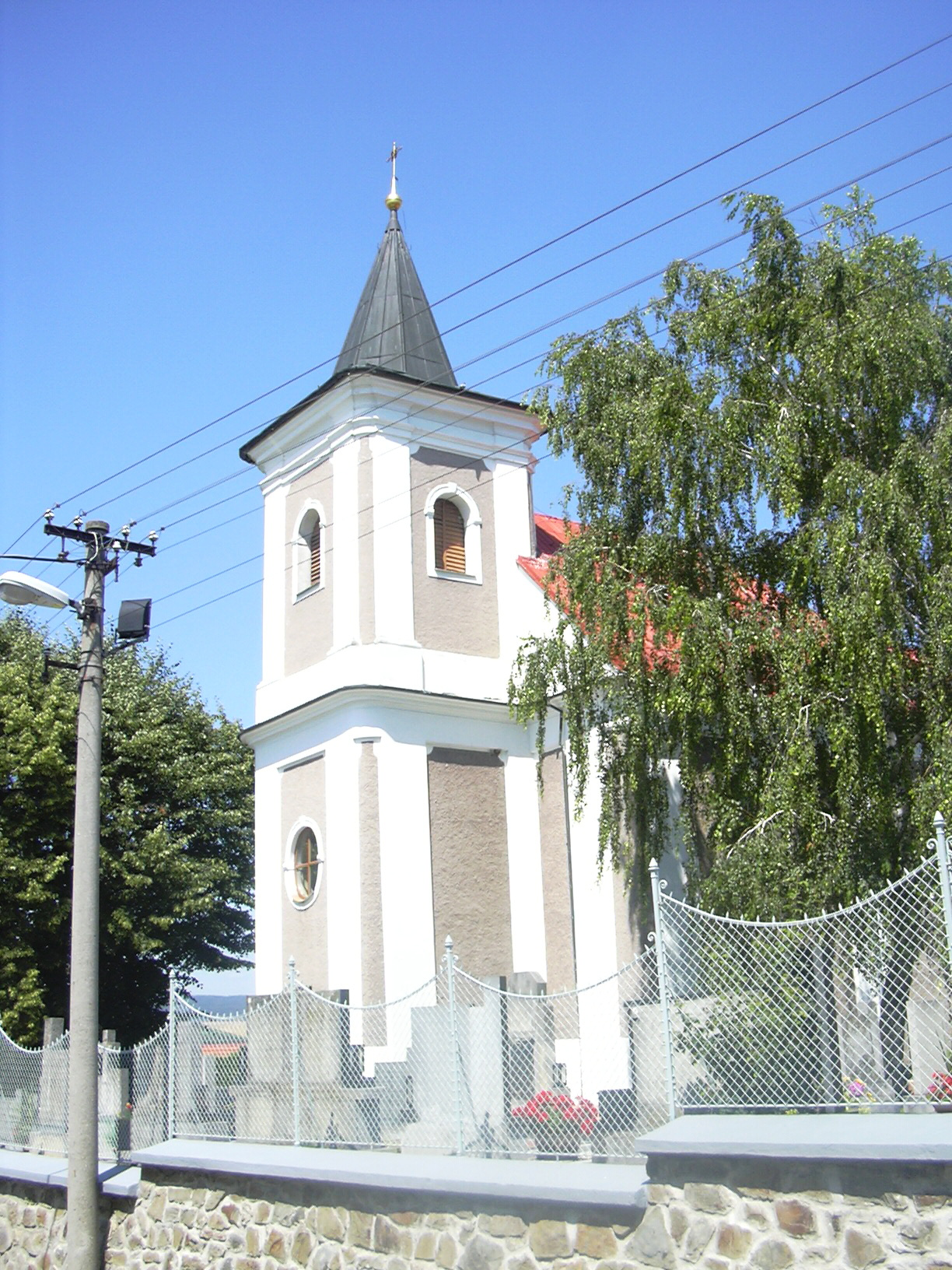 kostel sv. Barbory Velešovice(Vyškov- Czech republic)